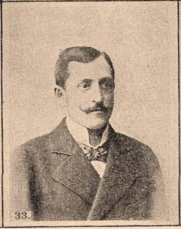 Koós Béla, főszolgabíró (füzéri járás), Sáros vármegye főispánja